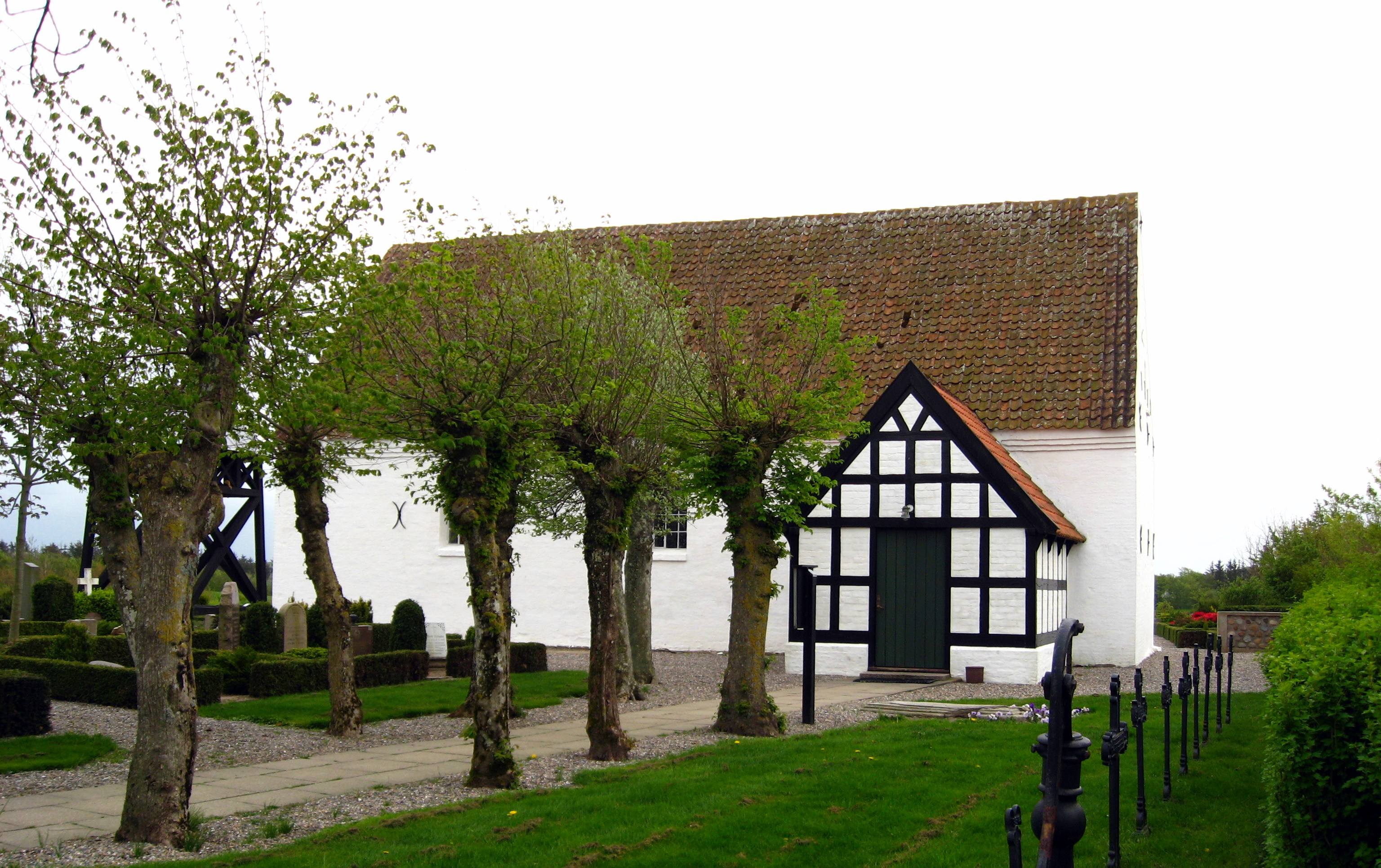 Asdal Kirke, Hjørring Kommune (tidl. Hirtshals Komm.)